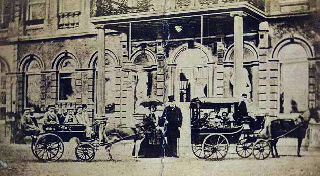 De familie Regout in Maastricht omstreeks 1869. Petrus en Aldegonda Regout centraal op de foto. Links en rechts de kleinkinderen in paardenkoetsen. Op de achtergrond Kasteel Vaeshartelt. Foto in: Album de la famille de Mr. Pierre Regout à Maestricht. Vervaardigd door: Billon, Photographe, Neveu et Élève de Mr. Daguerre, rue des Recollets, 13, Paris. Bevat foto’s van diverse leden van de familie Regout en van de prenten uit het Album dédie à mes enfants et mes amis. Fotocollectie RHCL Maastricht, RAL P-0656-063.